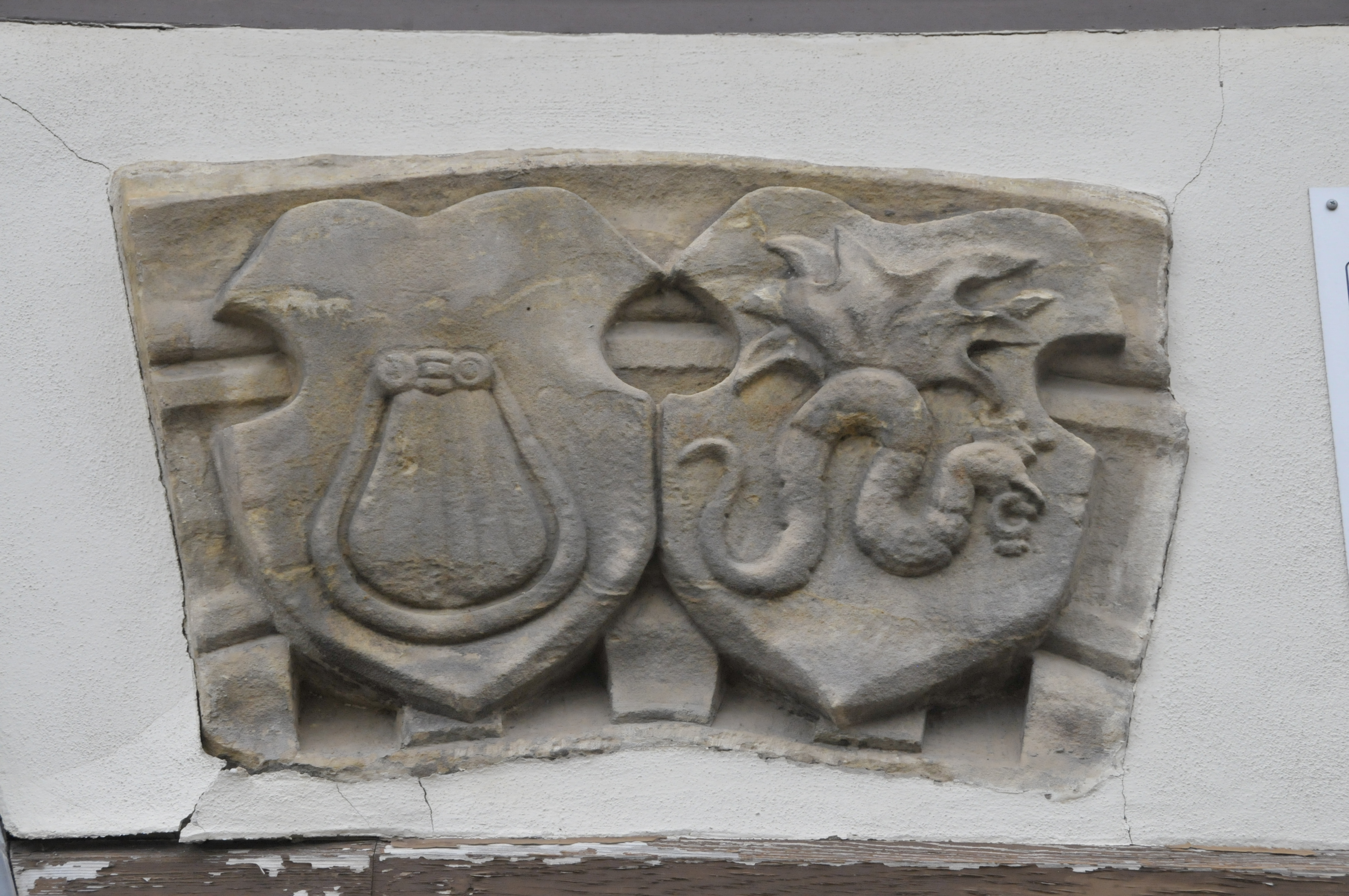 Gotha, Hauptmarkt 17: Wappen der Familie Dasch-Cranach, Tochter von Cranach d.Ä.